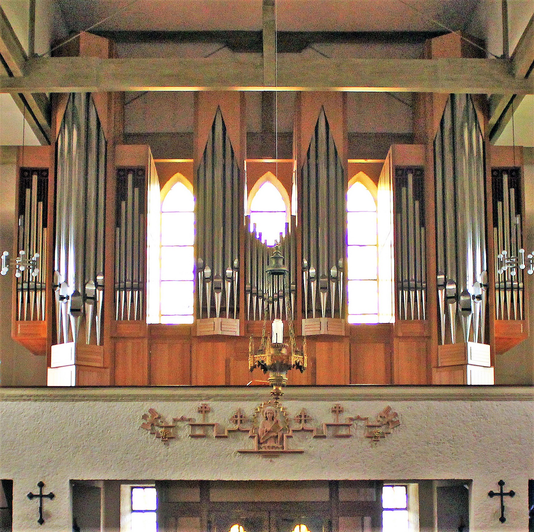 Blick ins Innere der katholischen Pfarrkirche St. Marien in Schmelz, Landkreis Saarlouis, Saarland